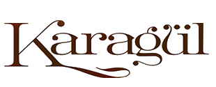 Logo de la serie de televisión Karagül